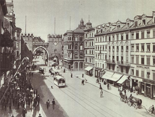 Neuhauserstraße mit Karlstor